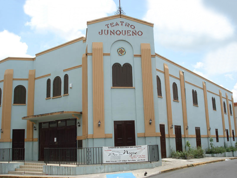 Teatro Junqueño Rafael A. Castro Pereda in Juncos, PR Town.